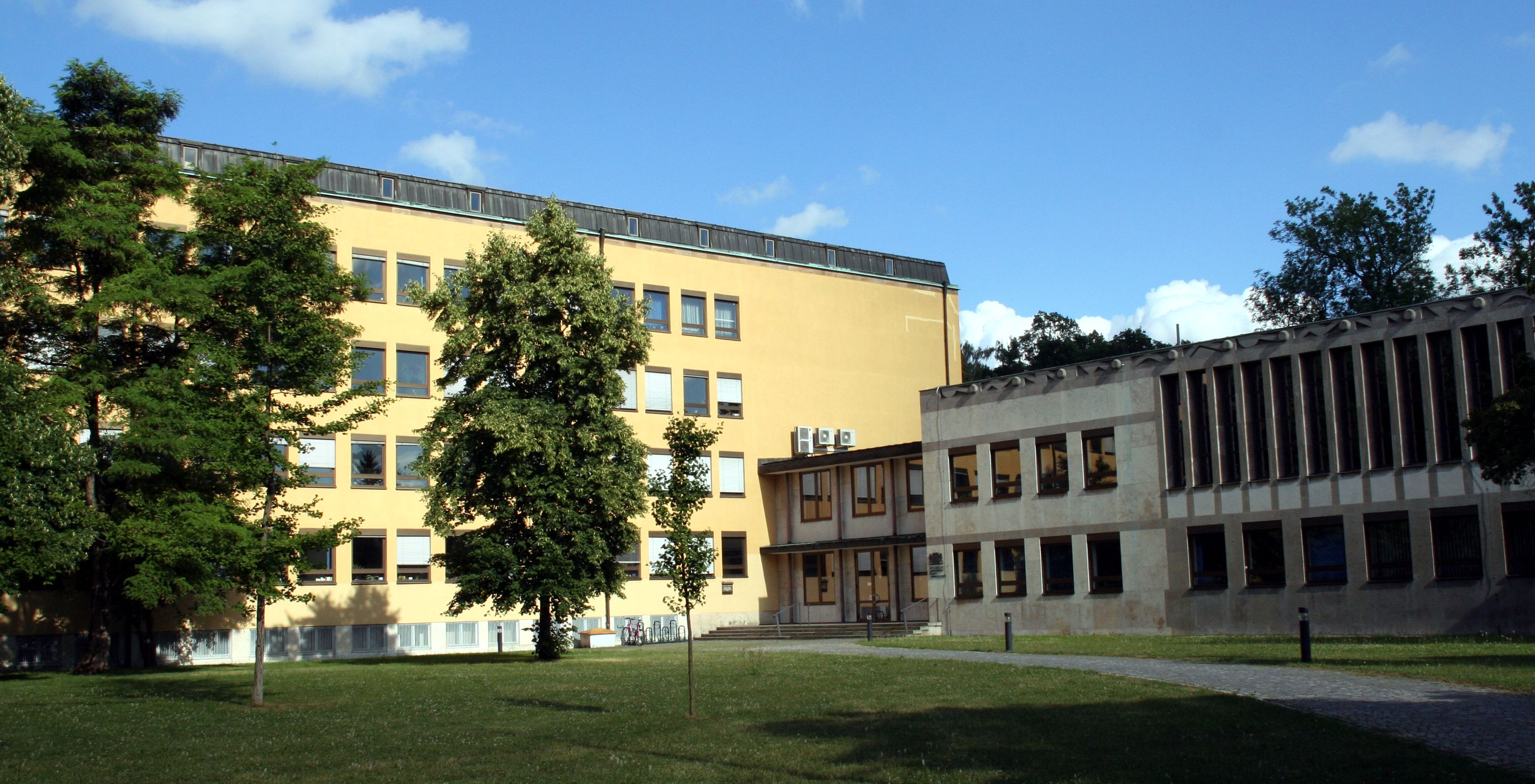 Ketschendorferstraße 1, Justizgebäude in Coburg